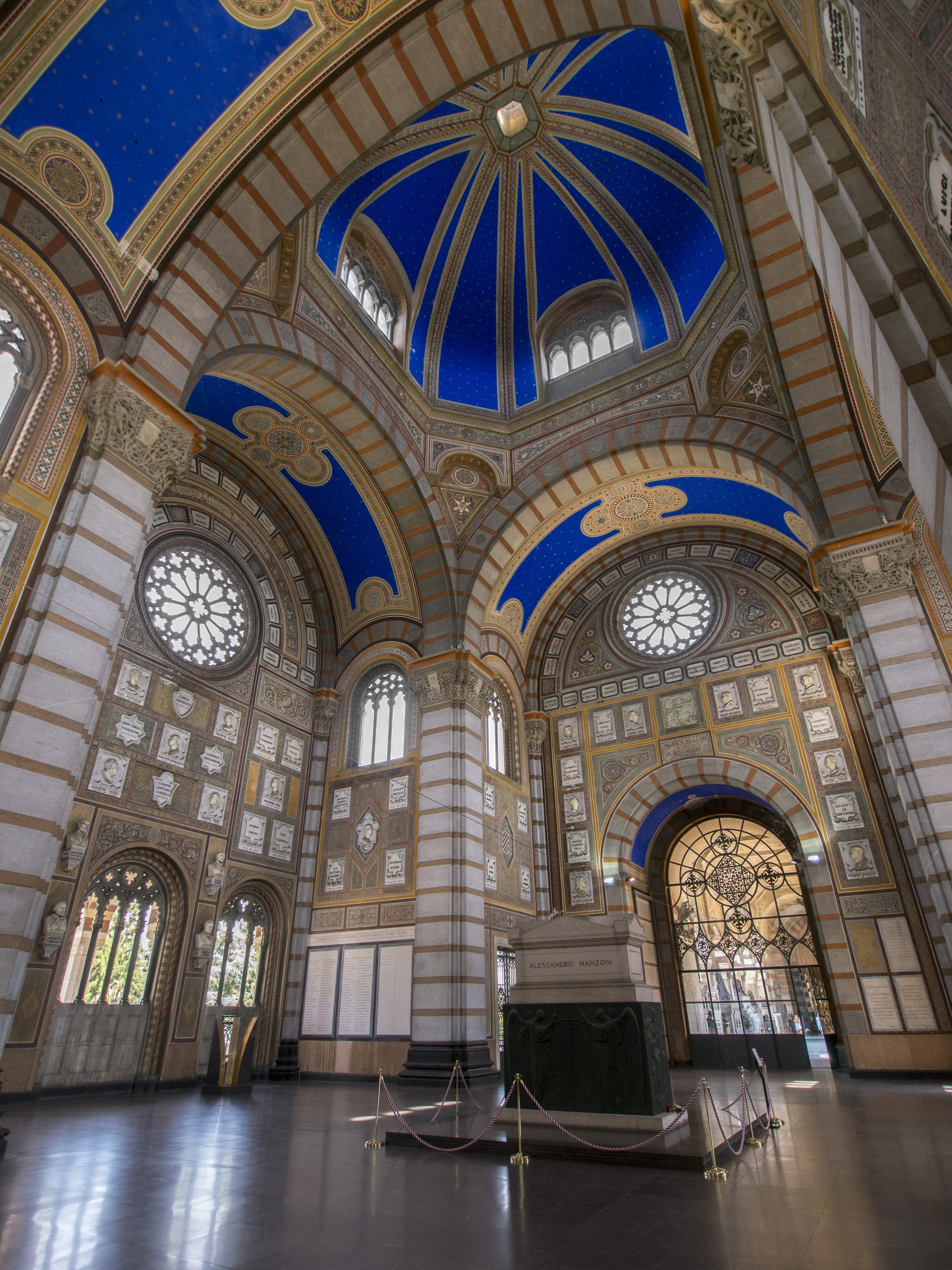 Cimitero Monumentale Central Hall